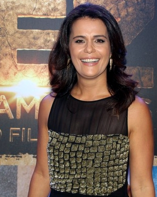 A jornalista brasileira Adriana Araújo